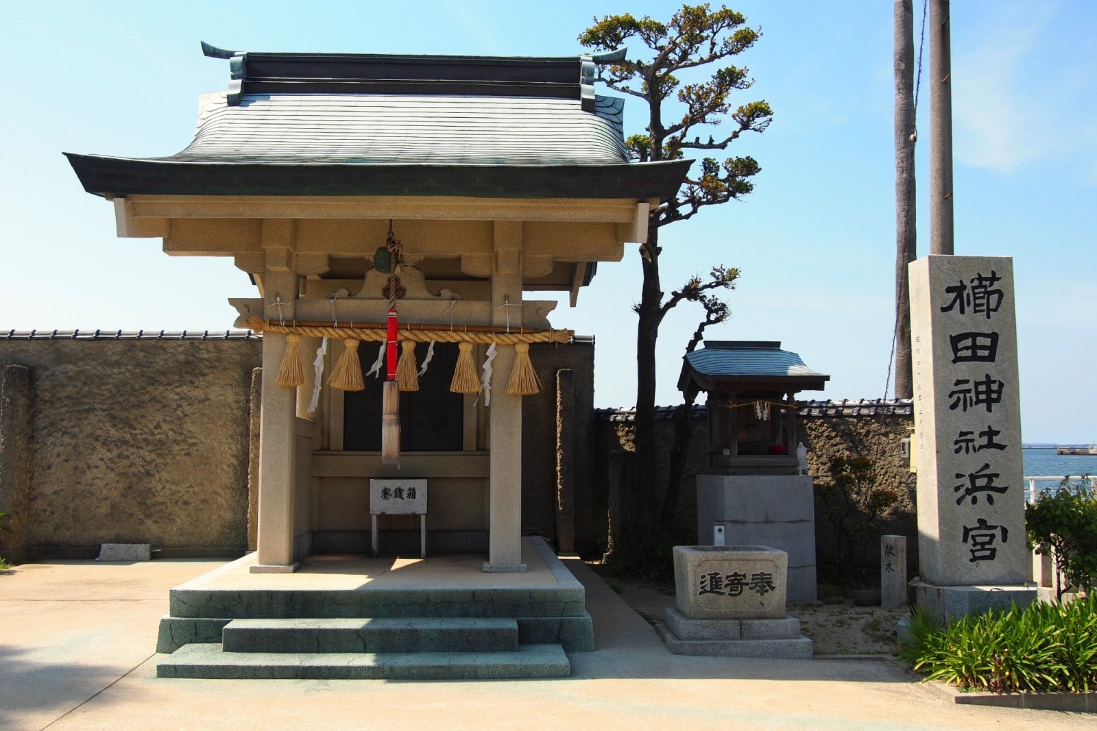 福岡市博多区 博多ふ頭 櫛田神社浜宮